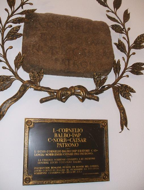 Cáceres (España): Elogio a Balbo. Inscripción original y transcripción en el despacho de la Alcaldía de a ciudad de Cáceres. Corresponde con AE 1962, 71: L(ucio) Cornelio Balbo imp(eratori) / c(olonia) Norba Caesa(rina) / patrono